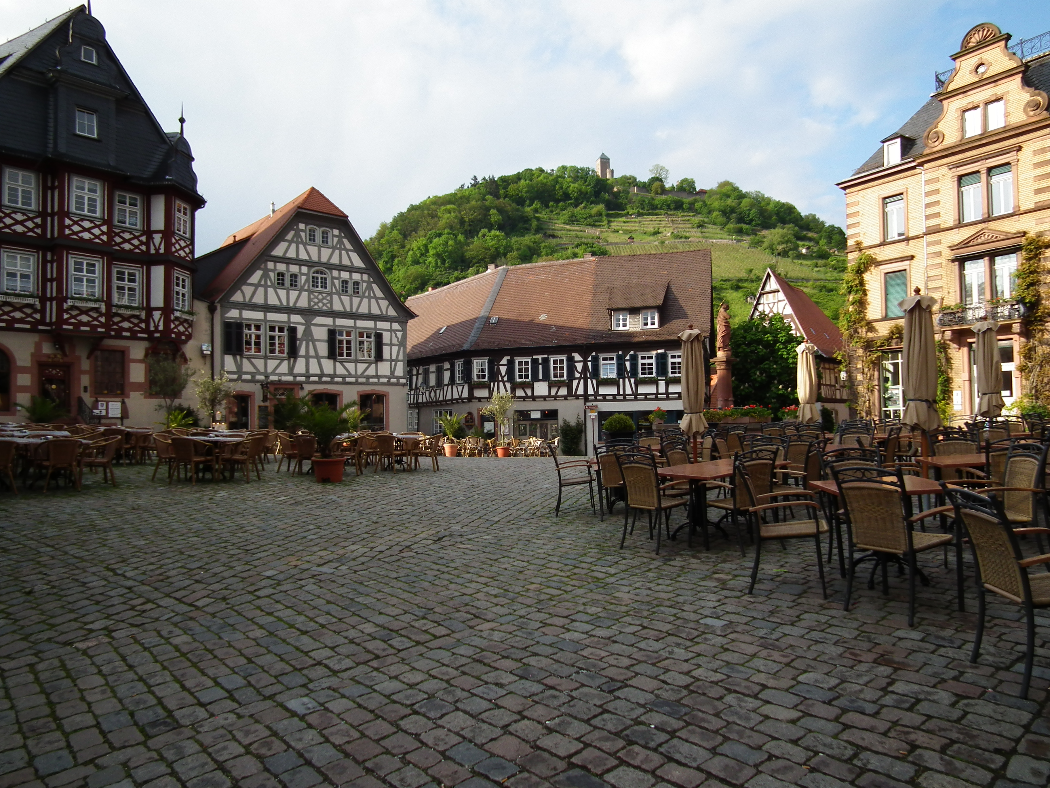 Historischer Marktplatz in Heppenheim mit Blick auf die Starkenburg (Kreis Bergstraße, Hessen, Deutschland)